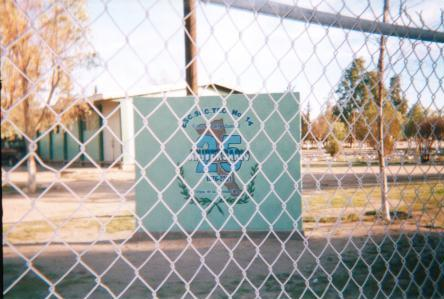 Secundaria Tecnica 14 Valle de la Trinidad